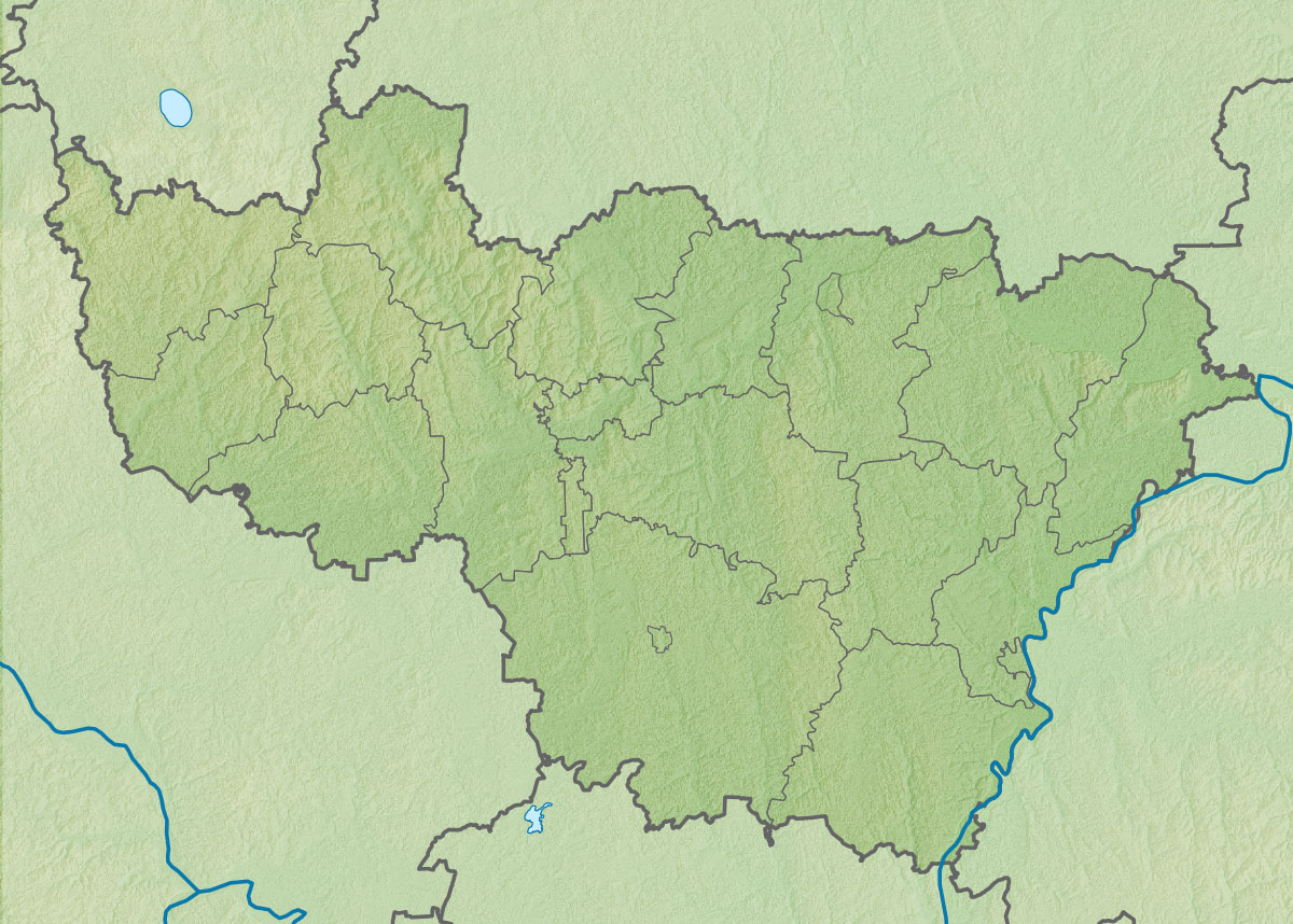 Физическая карта Владимирской области Проекция — равноугольная. Стандартная параллель — 56°00′00″с.ш. Параметры шаблона (координаты краёв): |top = 57.0 |bottom = 55.0 |left = 38.1 |right = 43.1